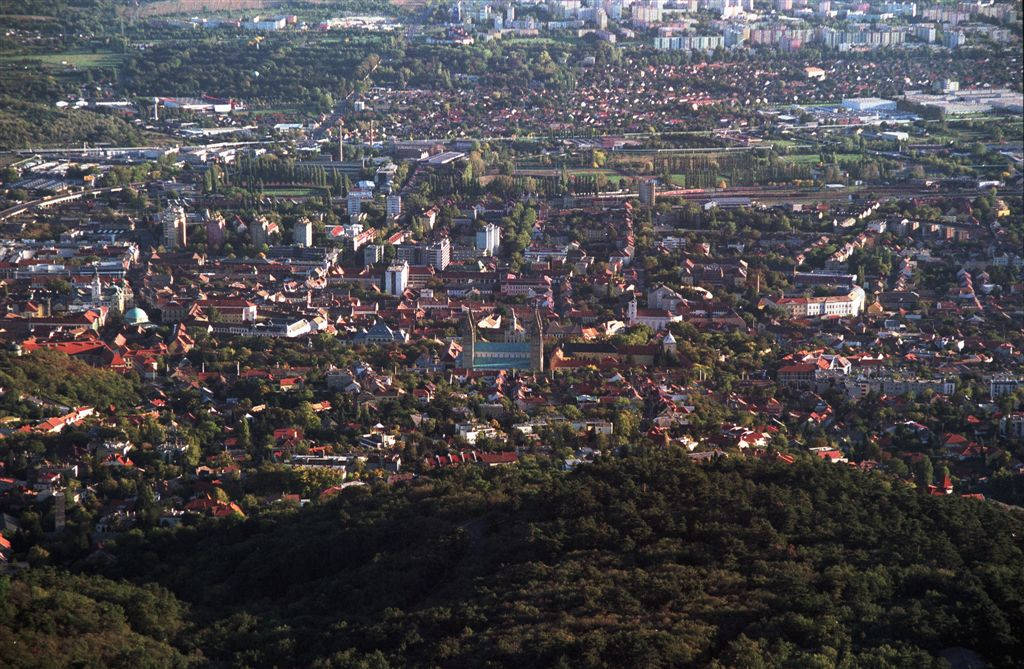 Pécs panoráma